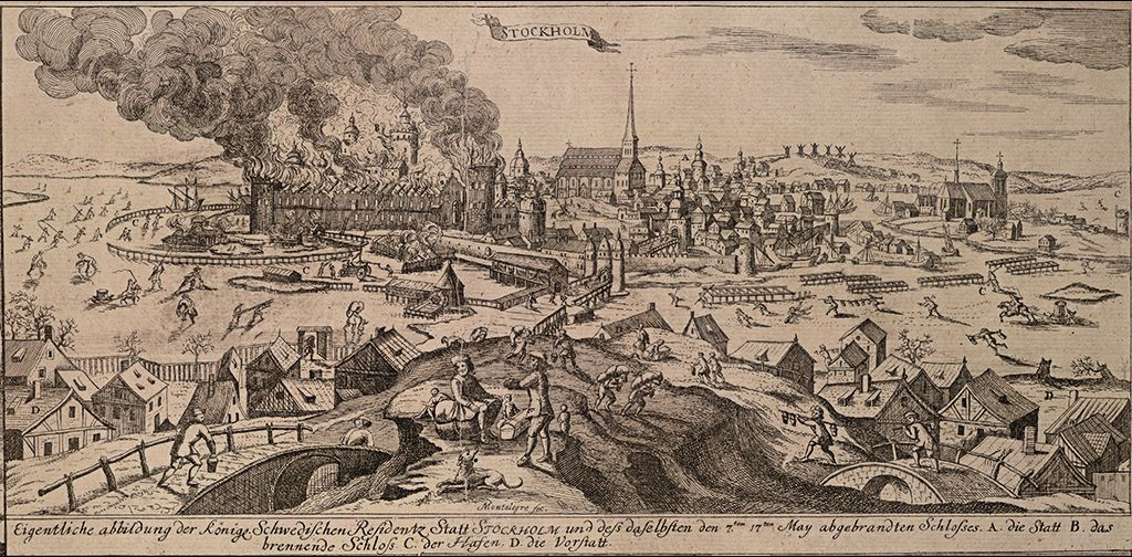 Tre Kronor brinner